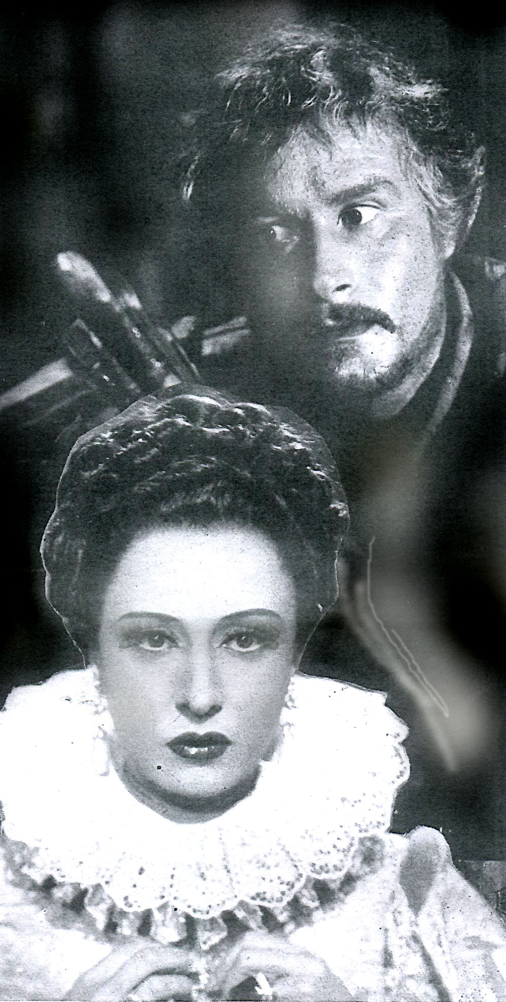 Clara Calamai ed Amedeo Nazzari in "Caravaggio, il pittore maldetto" (Alessandrini 1941)